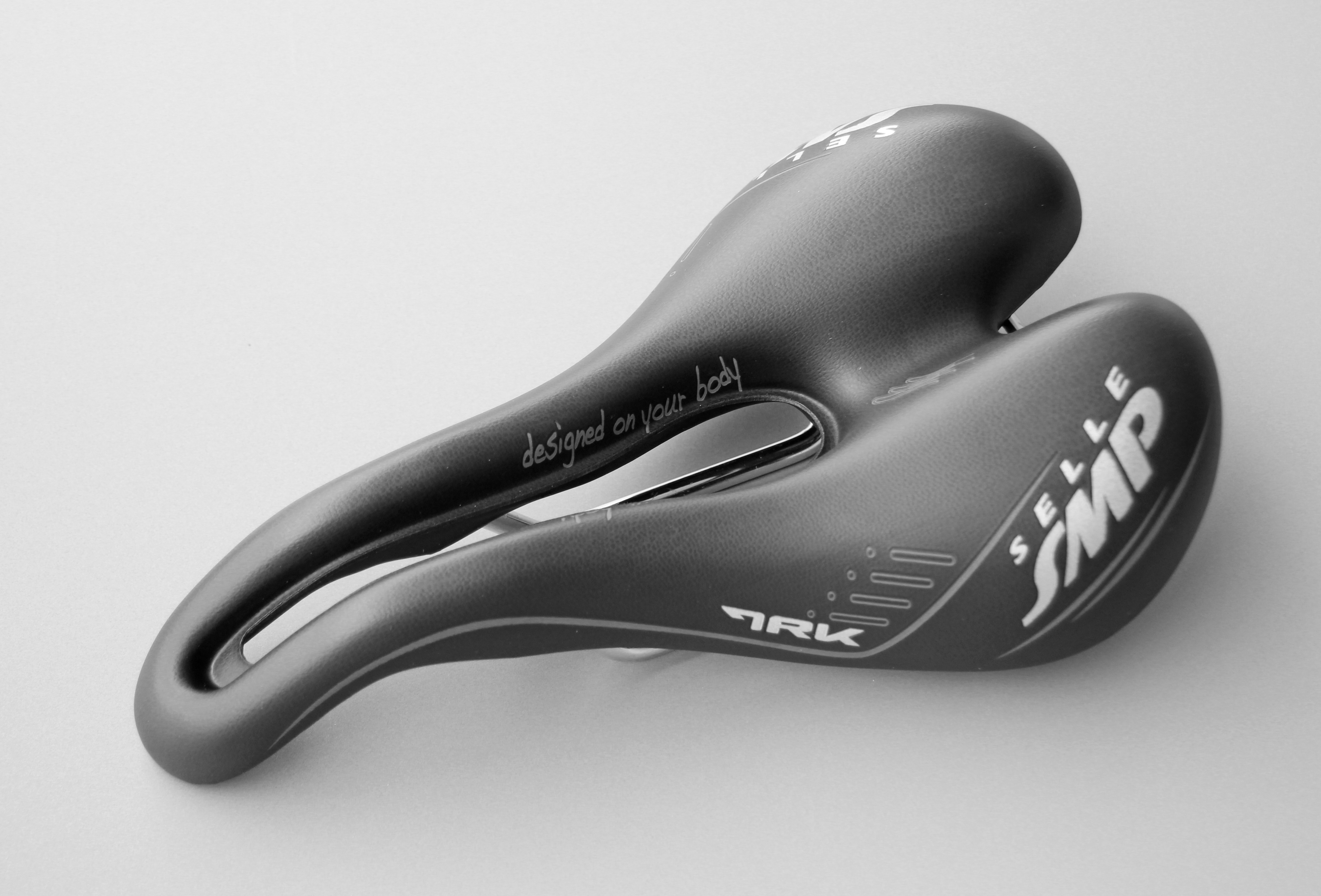 Bildinhalt: Fahrradsattel mit Mittelschlitz der Firma Selle SMP. Sicht von schräg oben. Schwarz/weiß. Aufnahmeort: Frankfurt am Main, Deutschland